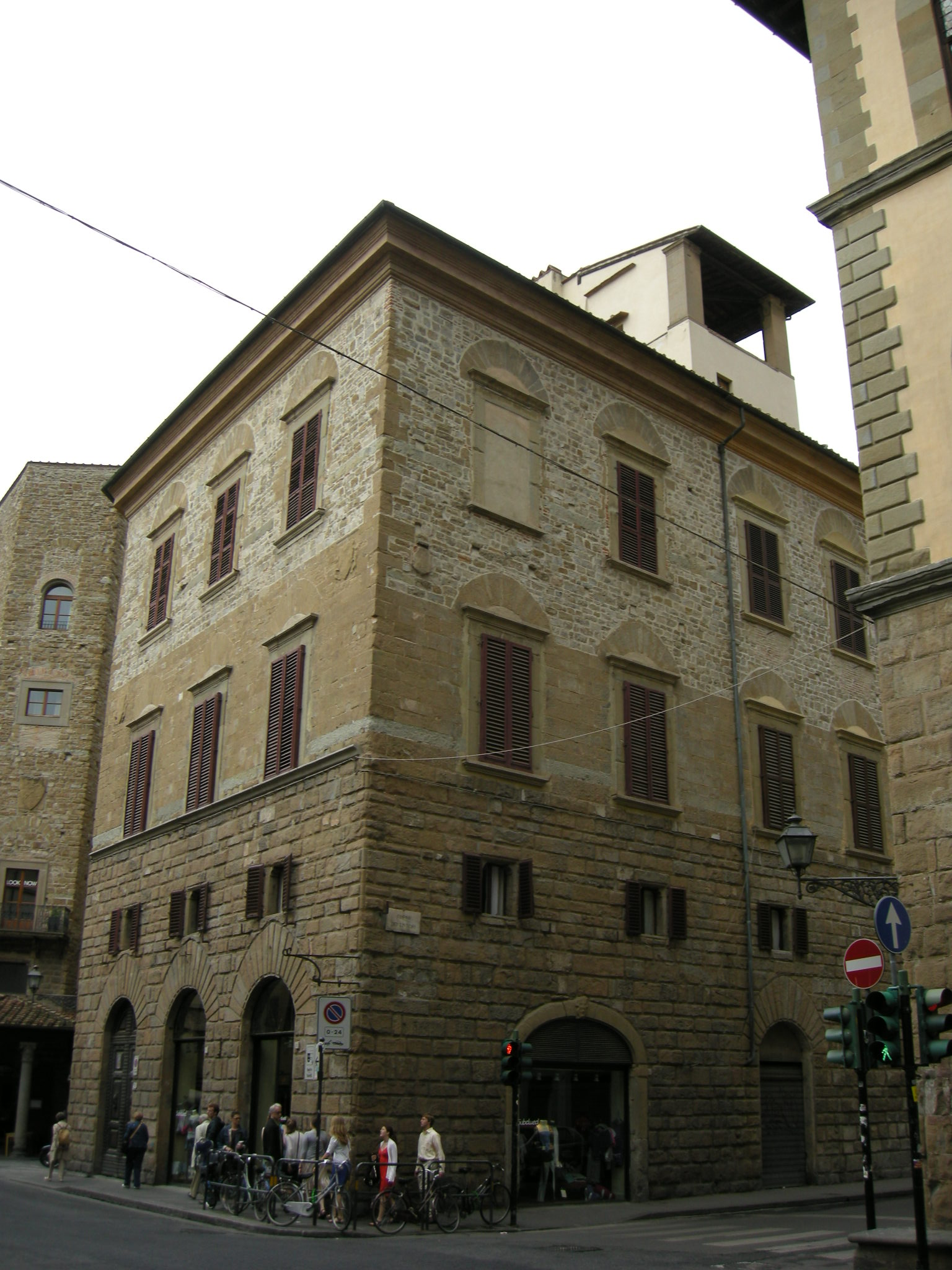 Palazzo via de' benci